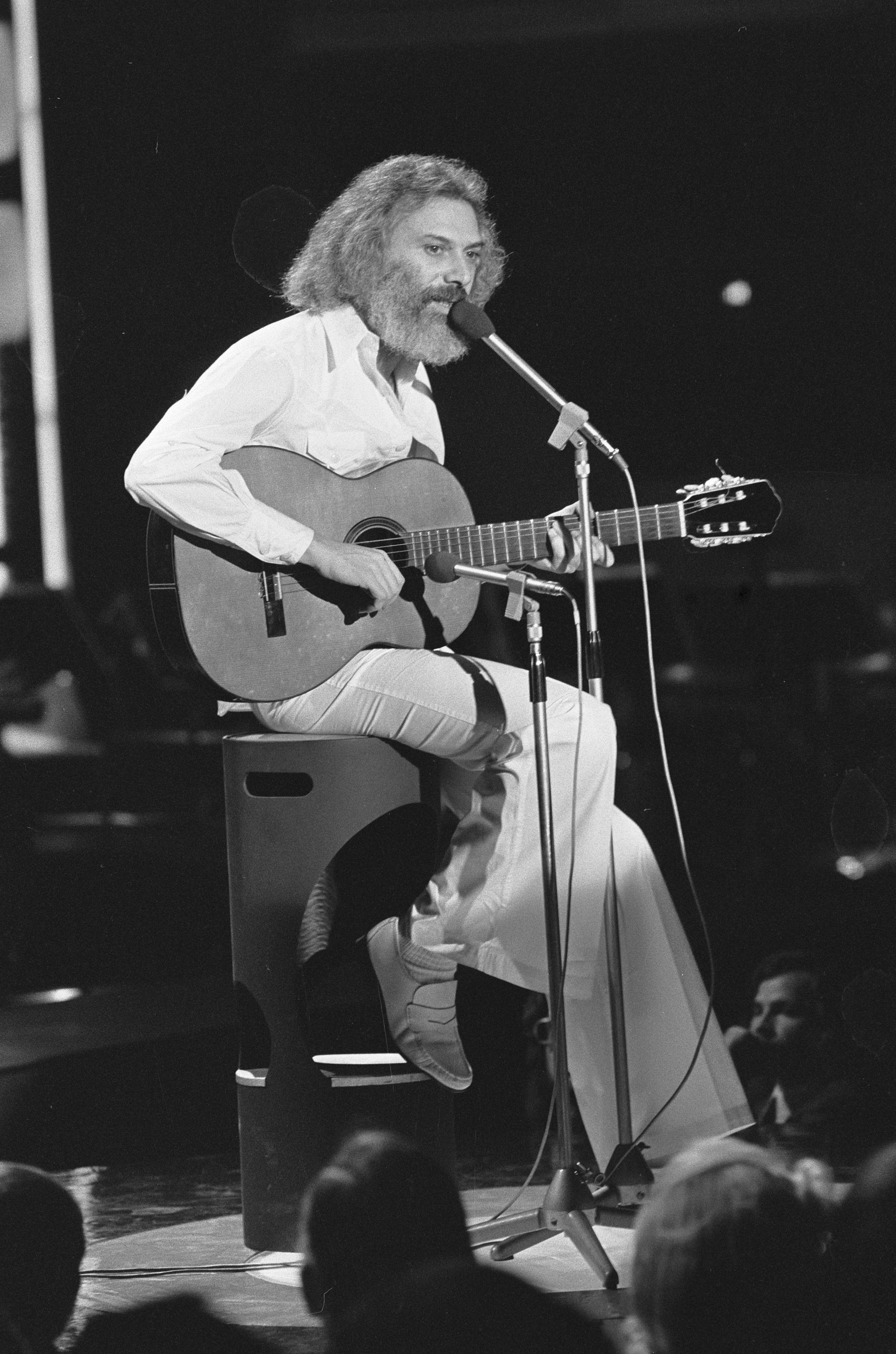 Collectie / Archief : Fotocollectie Anefo Reportage / Serie : Grand Gala du Disque in de RAI Beschrijving : Georges Moustaki Datum : 17 februari 1974 Locatie : Amsterdam, Noord-Holland Trefwoorden : festivals, zangers Persoonsnaam : Moustaki, Georges Instellingsnaam : RAI Fotograaf : Rob Mieremet / Anefo Auteursrechthebbende : Nationaal Archief Materiaalsoort : Negatief (zwart/wit) Nummer archiefinventaris : bekijk toegang 2.24.01.05 Bestanddeelnummer : 927-0097